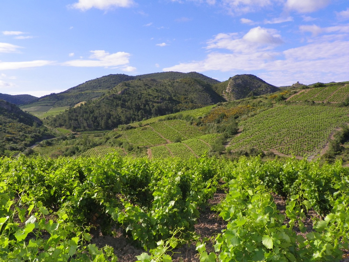 Vignoble en coteaux à Villeneuve-les-Corbières